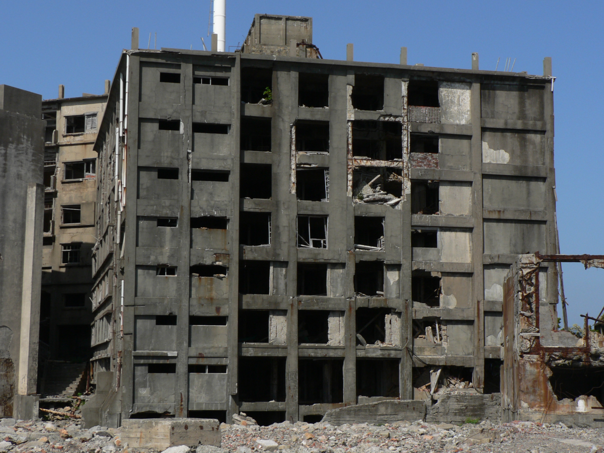 日本初のRC造アパートとされる、端島(軍艦島)の30号棟。1916年に4階建てで建設され、その後まもなく7階建てに増築。一部に地階もあった。